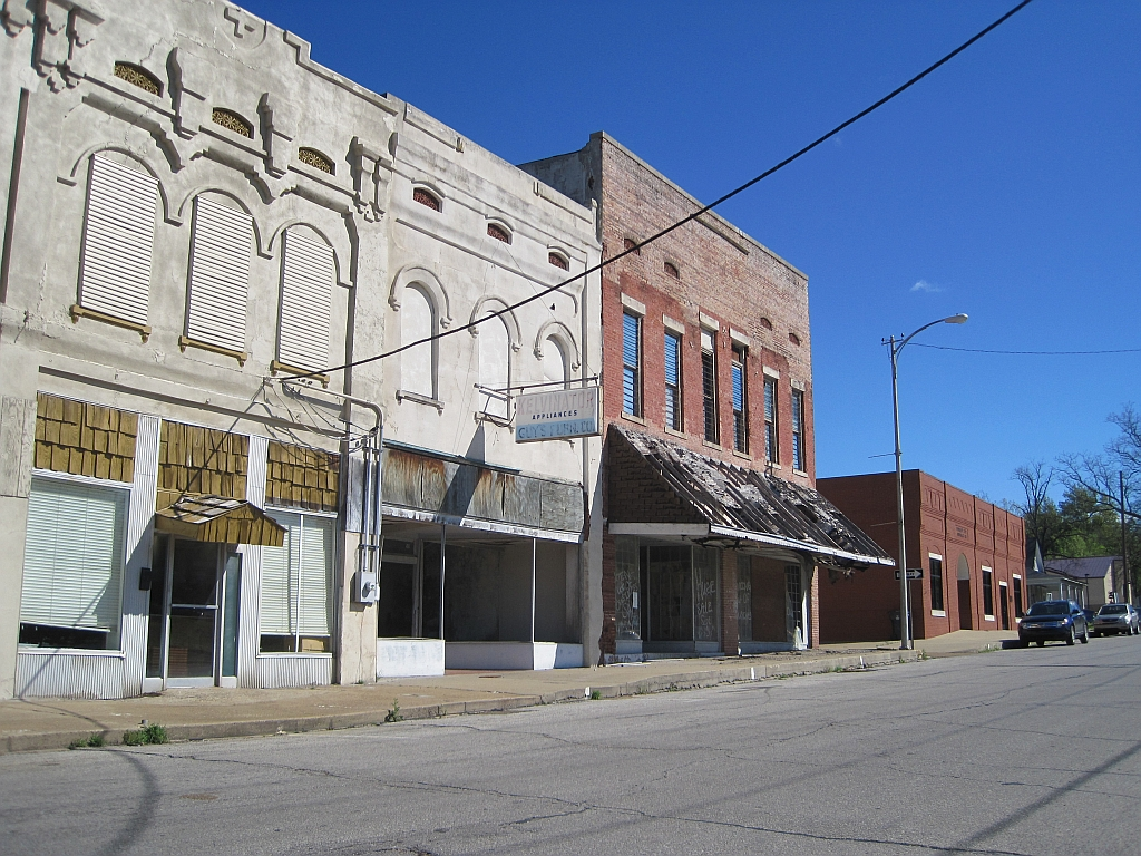 Forrest City, Arkansas